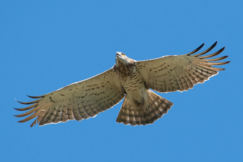 Aguila Culebrera Circaetus gallicus. Punta Carnero, Andalusia, Spain.